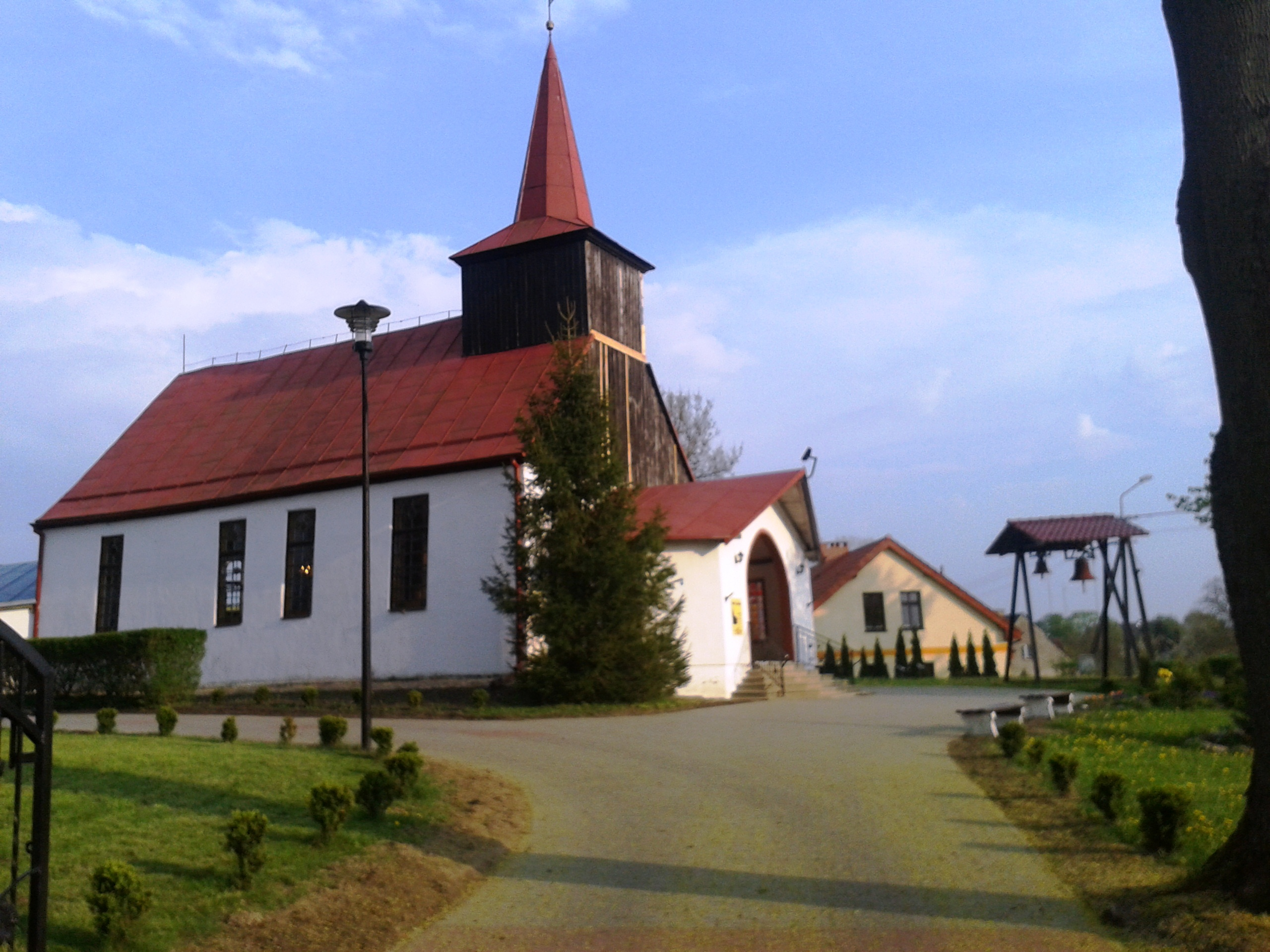 Suliszewo - dawny kościół ewangelicki, obecnie rzymskokatolicki kościół filialny p.w. Chrystusa Króla, XVIII, 1850, l.80. XX, 1999